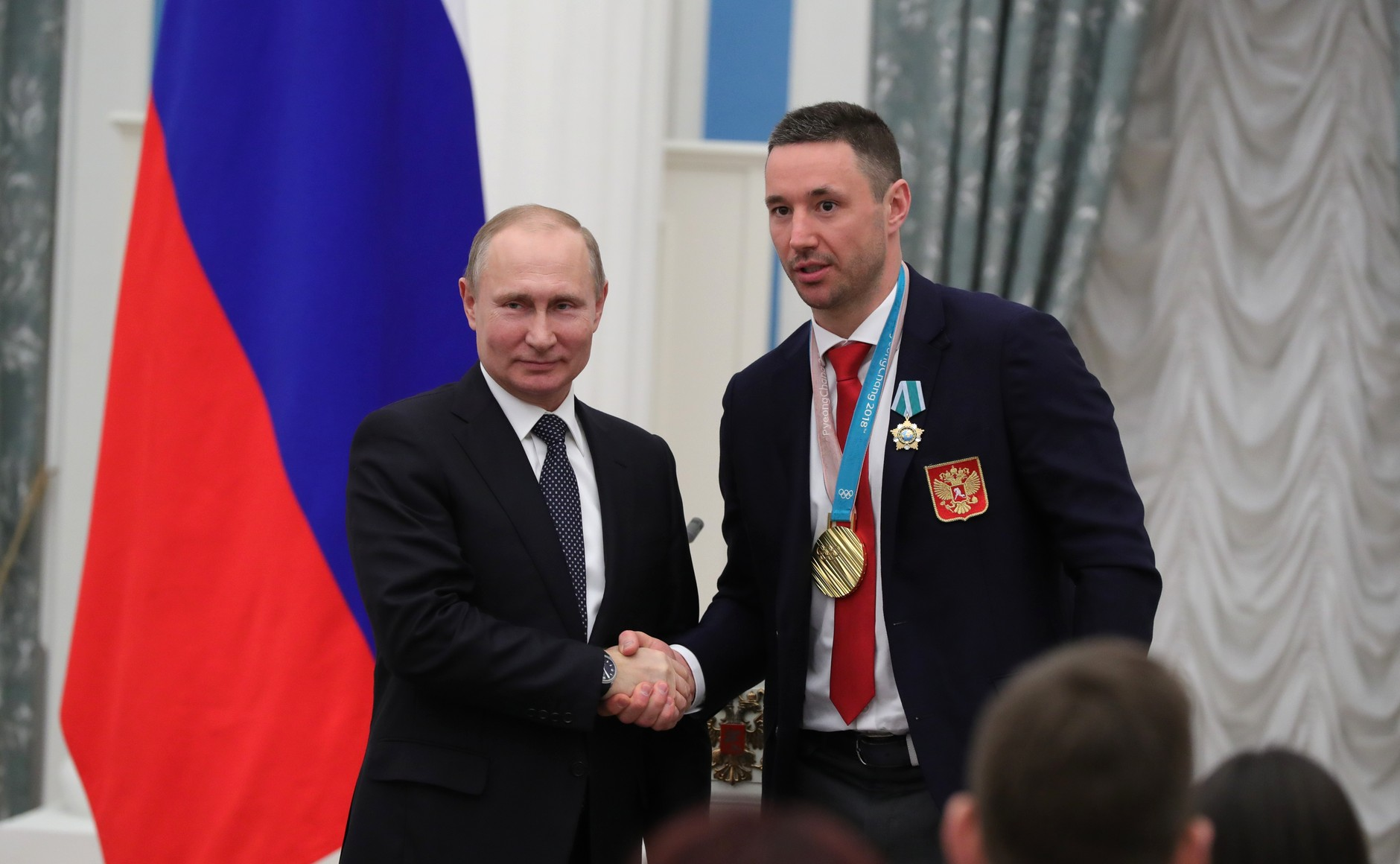 С олимпийским чемпионом по хоккею Ильёй Ковальчуком